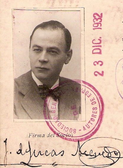 JLAcevedo SGAE